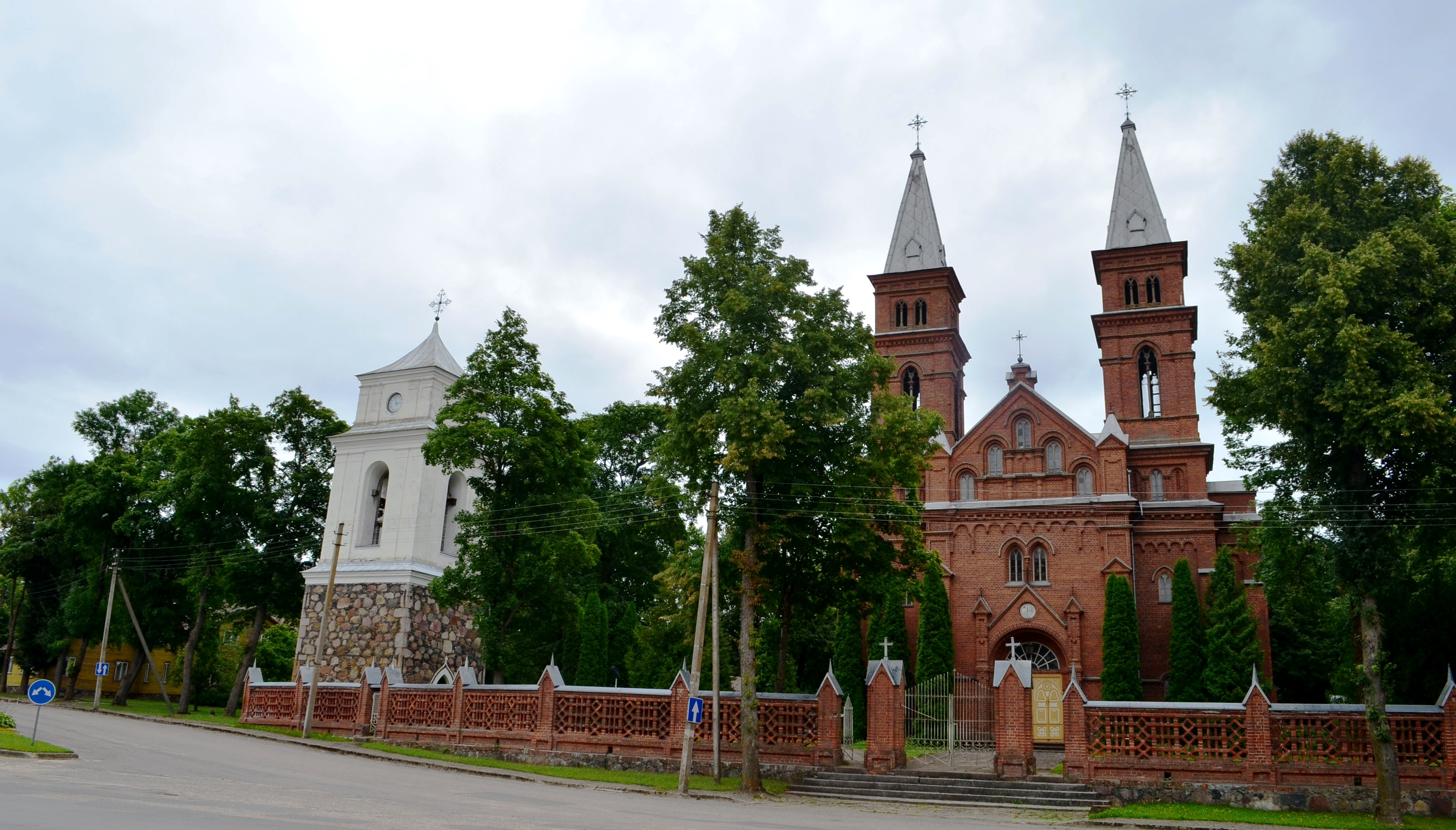 Užpalių bažnyčia, Utenos r.